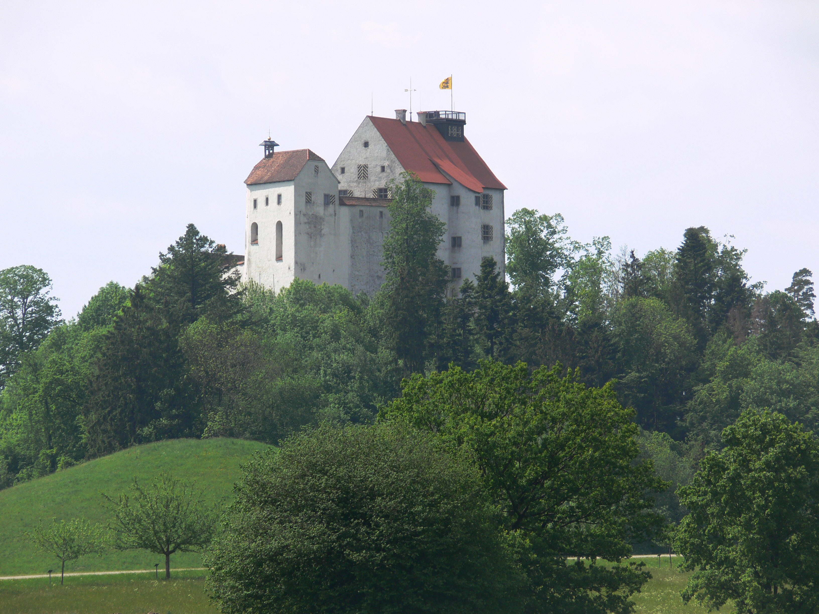 Die Waldburg in 88289 Waldburg